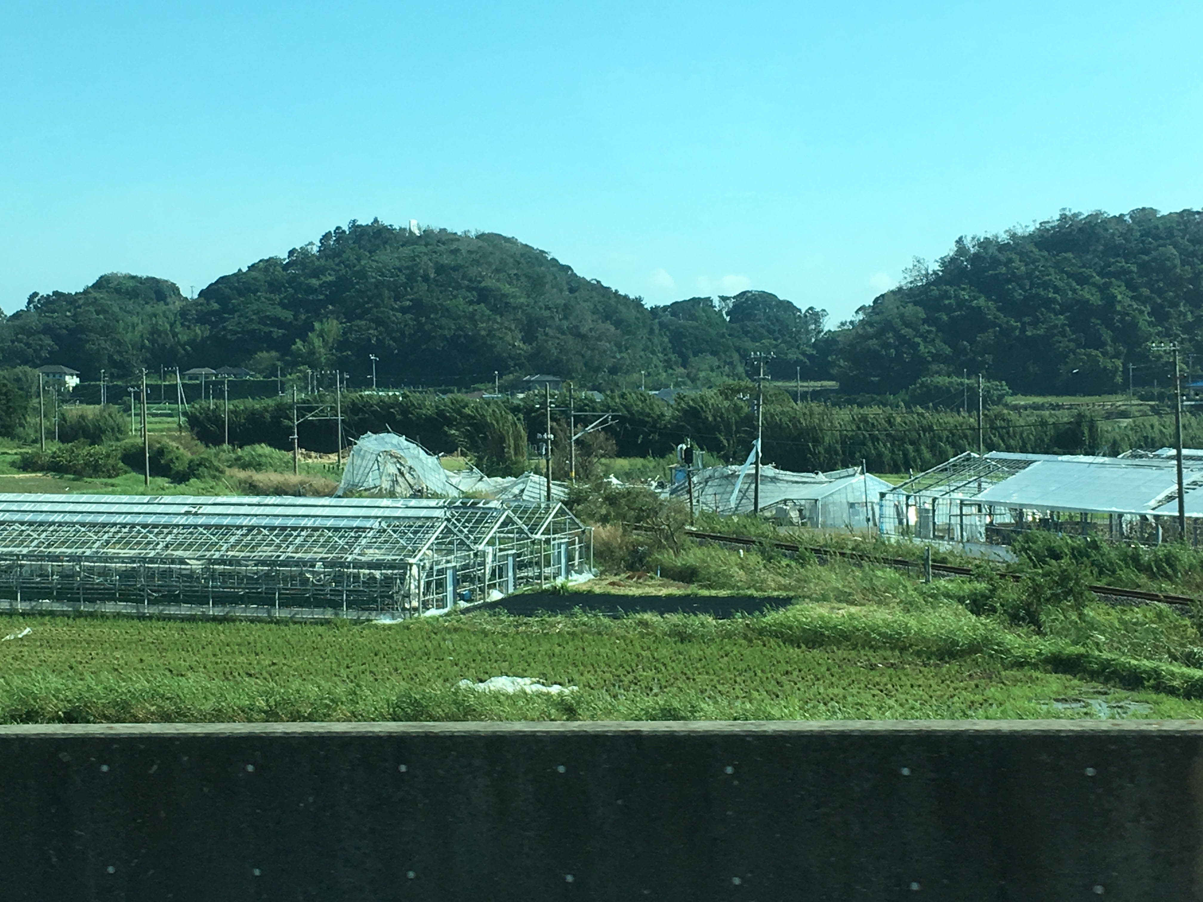 南房総市富浦〜館山近辺